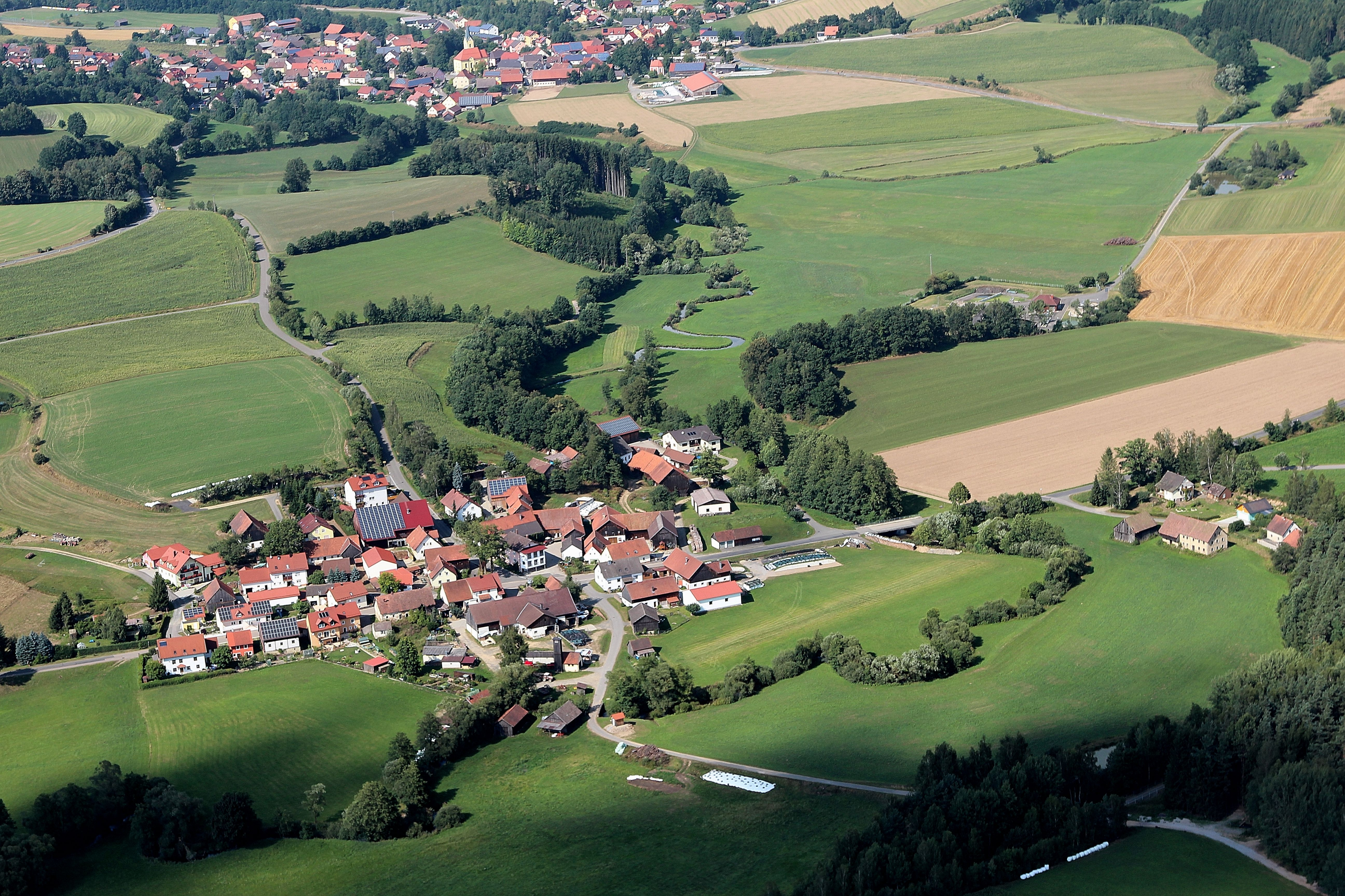 Notterdorf, im Hintergrund am oberen Bildrand Niedermurach (Landkreis Schwandorf, Oberpfalz, Bayern)